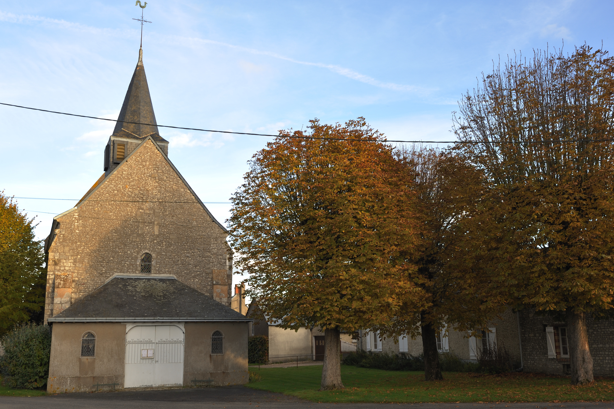 Église Saint-Benoît et Sainte-Candide de Crottes-en-Pithiverais, Loiret, France